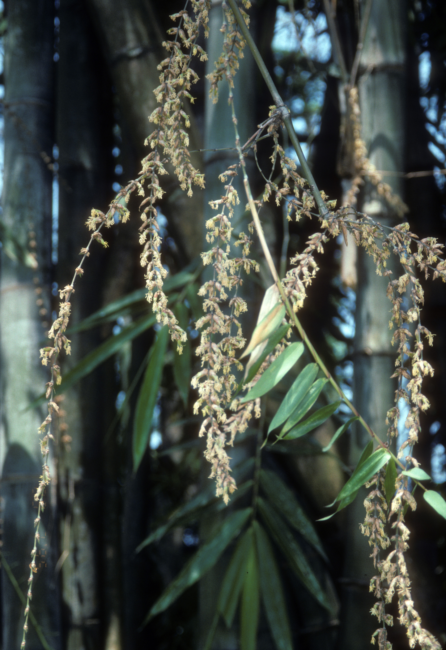 Dendrocalamus giganteus Botanic Garden, Bogor, Indonesia